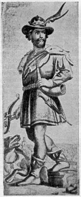 van